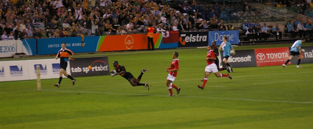 Uganda vs. Tonga try